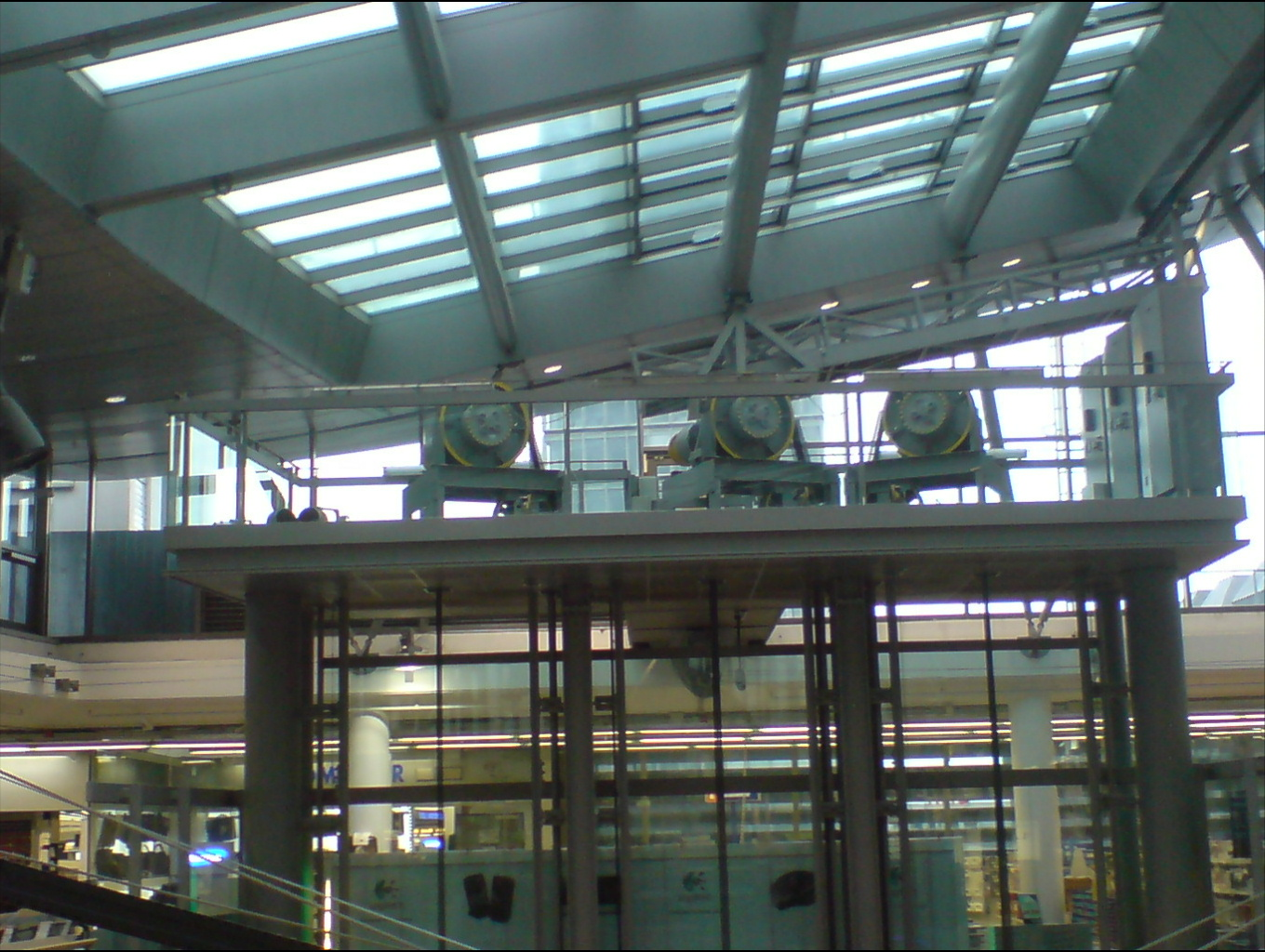 Treibscheibenantrieb einer Aufzugsgruppe in einem Einkaufszentrum